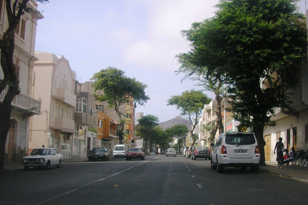 Baltasar Lopes da Silva avenue in Mindelo town, São Vicente island, Cape Verde